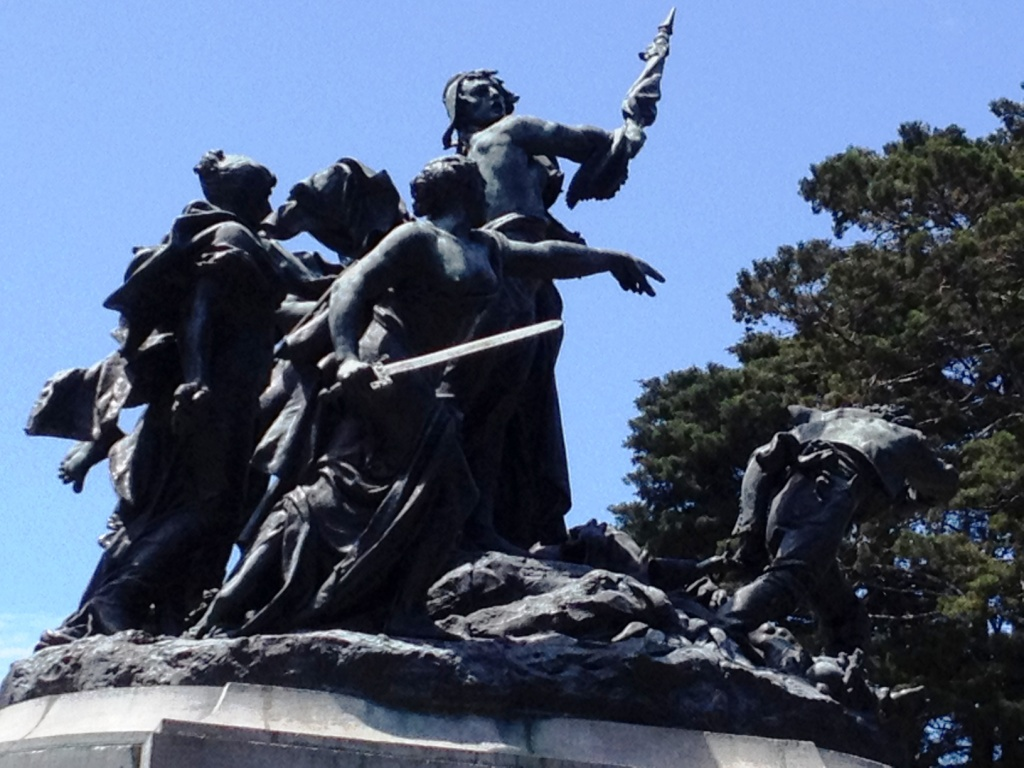 Detalle del Monumento Nacional de Costa Rica, en honor a la Campaña Nacional de 1856, contra la invación a Centro América por parte de los estados esclavistas de USA, en la cual fueron derrotados por los costarricenses para preservar su libertad e independencia. By Louis-Robert Carrier-Belleuse